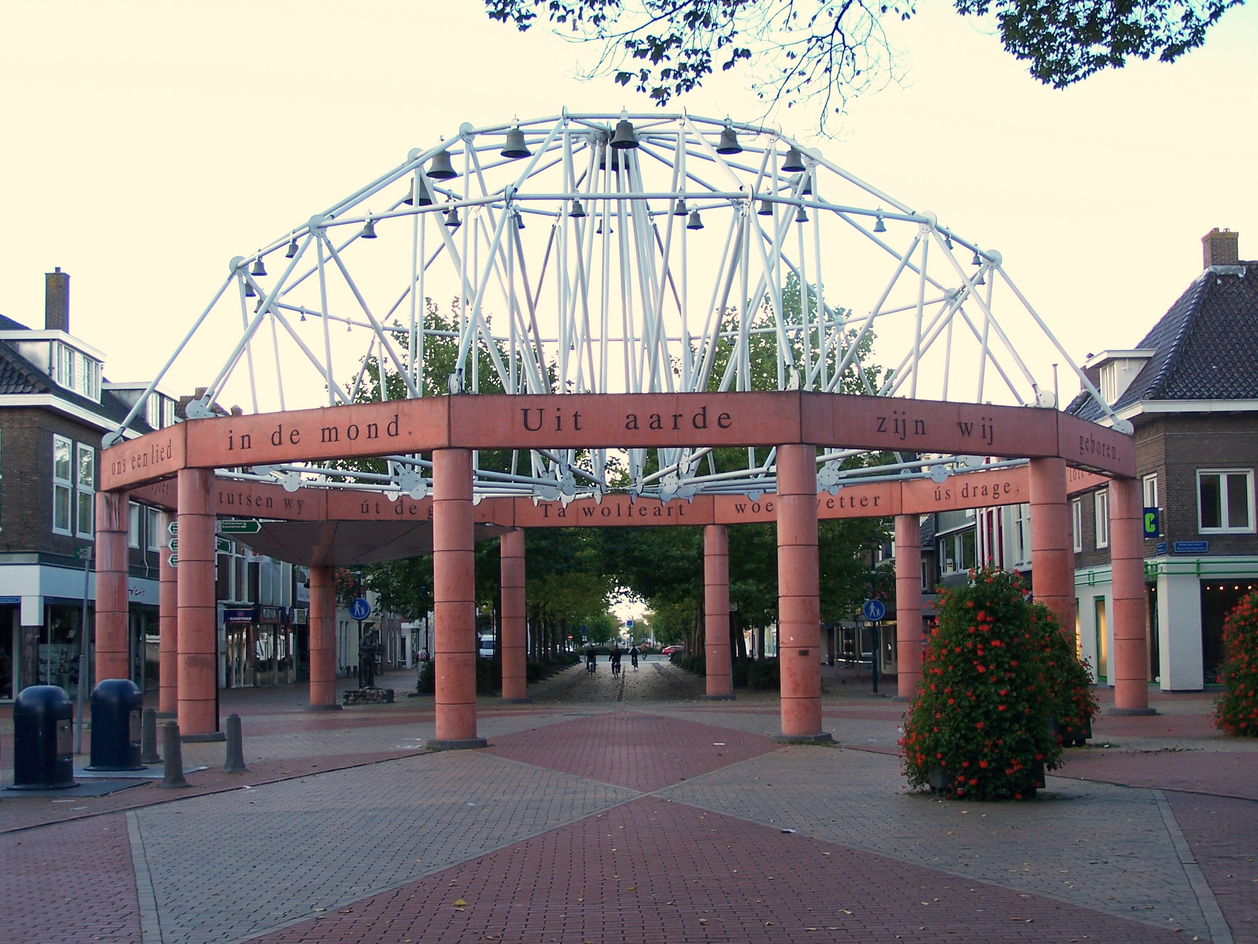 Drachten